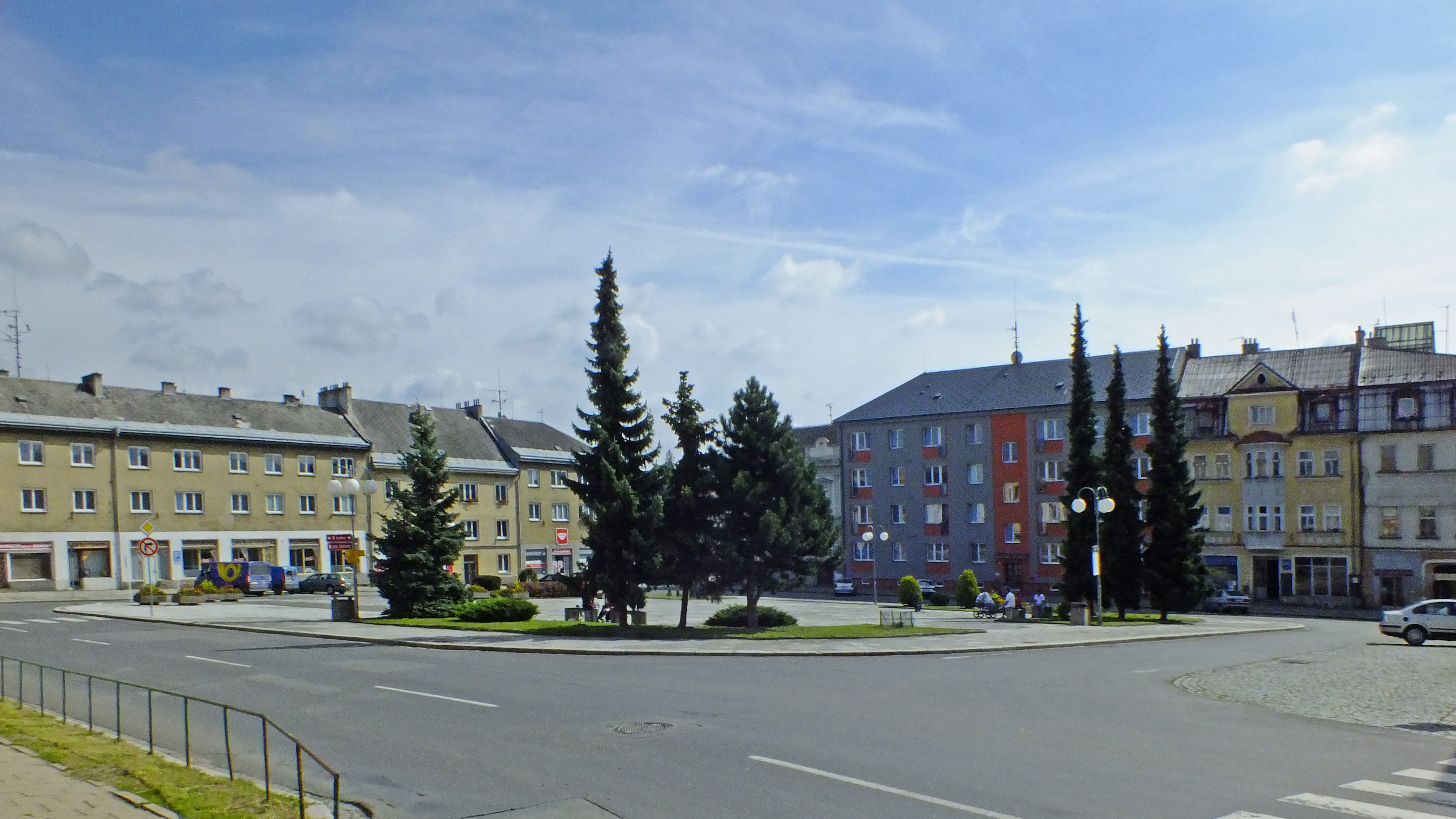 Centrum Města